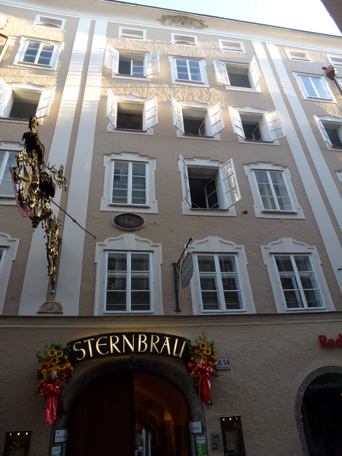 Gasthaus, Sternbräu mit Arkadenhof und Sternstöckl